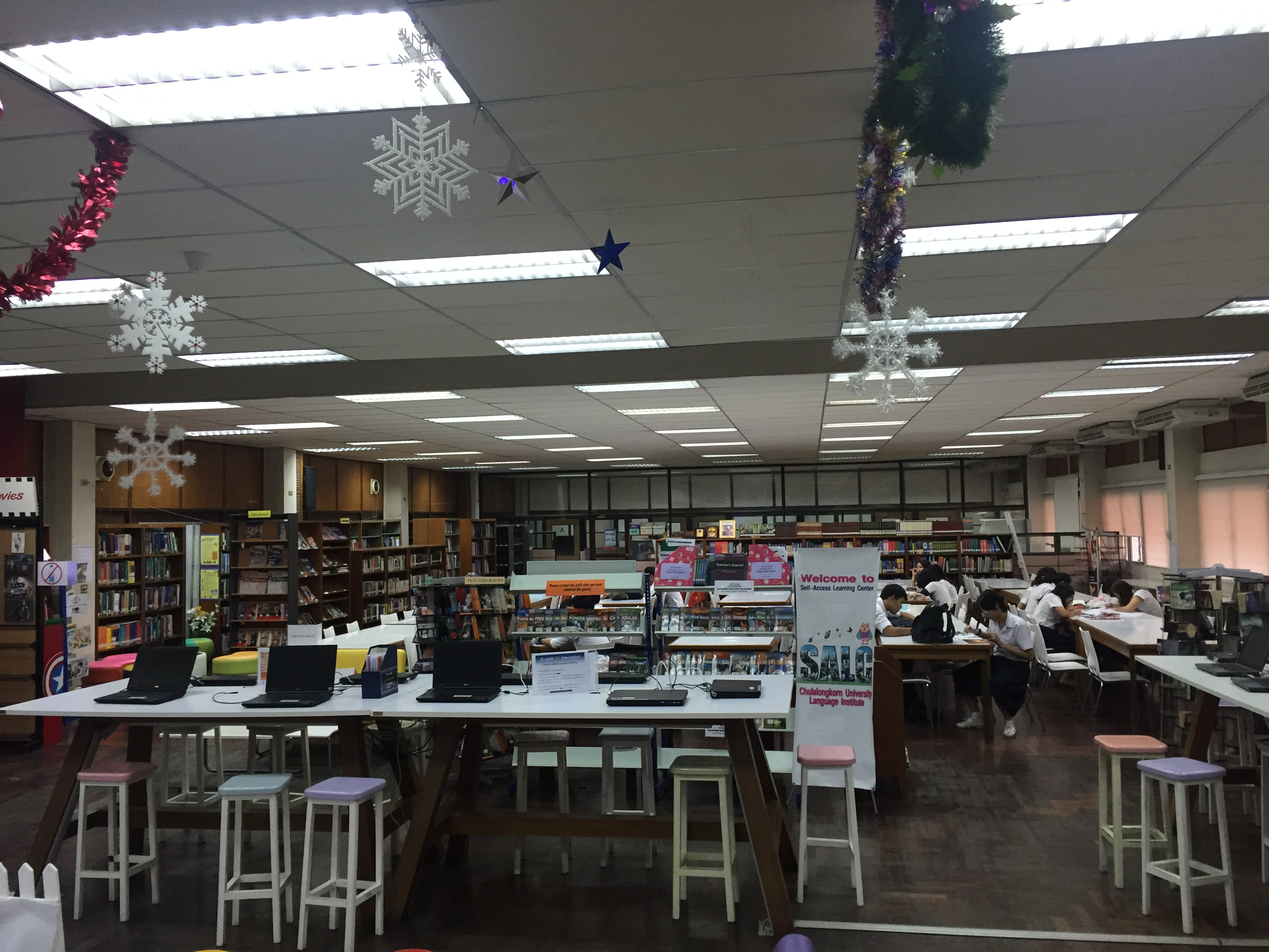 ศูนย์การเรียนรู้ด้วยตนเอง สถาบันภาษา จุฬาลงกรณ์มหาวิทยาลัย